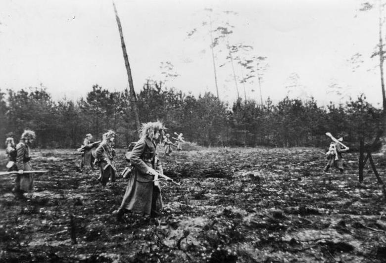 Westfront, Grenadiere gehen bei Aachen vor Scherl Bilderdienst Feindeinbruch in die HKL wird bereinigt. In einem Abschnitt der Front um Aachen ist der Feind in das Hauptkampffeld eingebrochen. Sofort treten Grenadiere an, um den Einbruch wieder zu bereinigen. Mit schußbereitem Gewehr gehen sie über eine Waldlichtung vor. Achtung bei Abdruck nennen: PK-Aufnahme, Kriegsberichter Lohrer (Sch), 12.12.44 [Herausgabedatum]